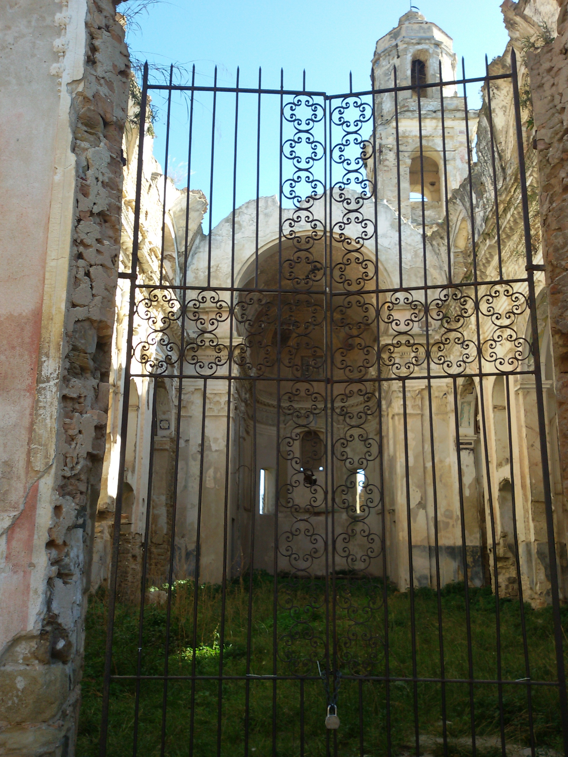 Cancello all'ingresso dei resti della chiesa di S. Egidio a Bussana Vecchia